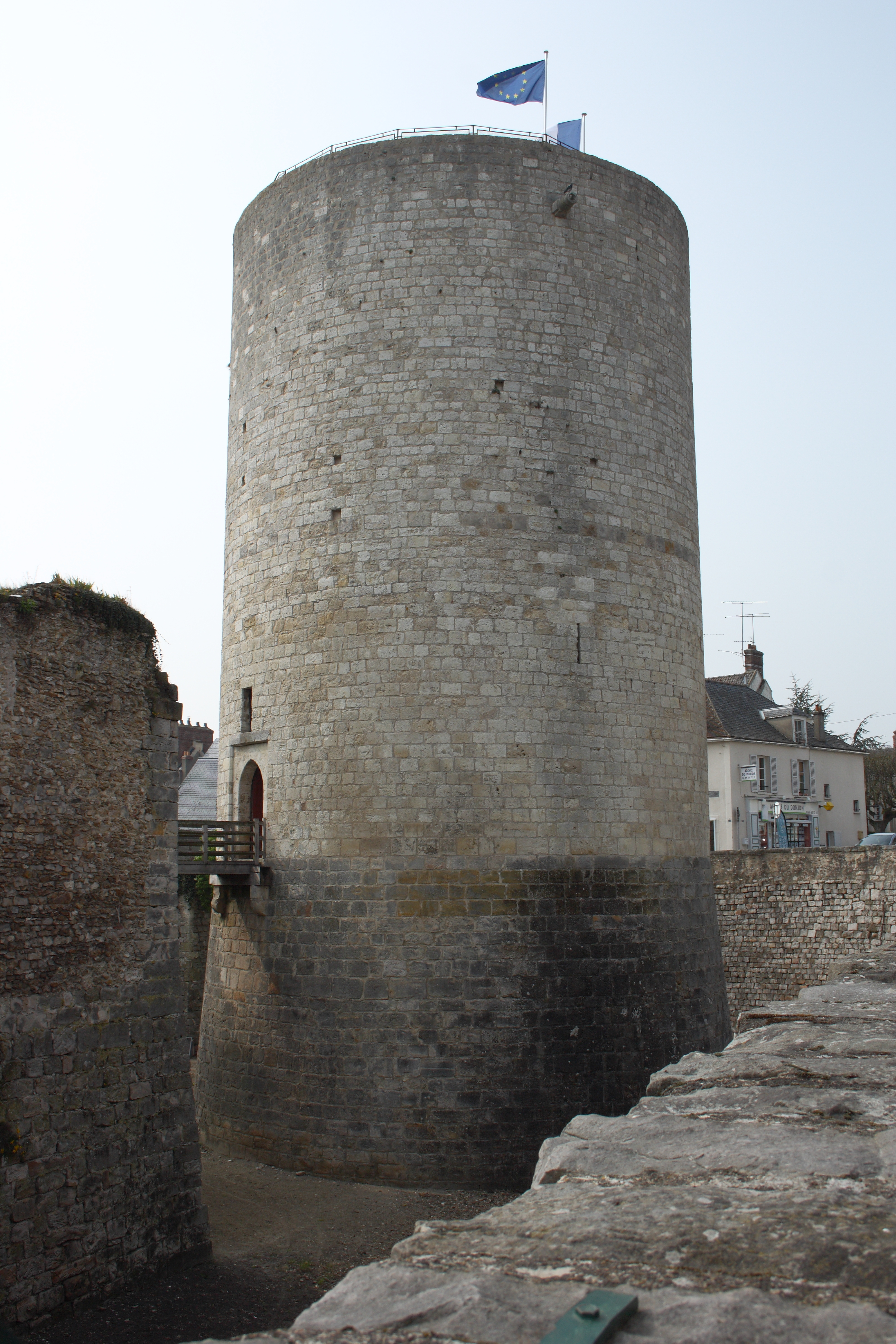 Burg von Dourdan im Département Essonne (Île-de-France)